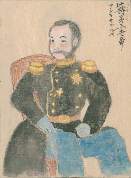 アレクサンドル2世 高嶋祐啓『欧西行紀』